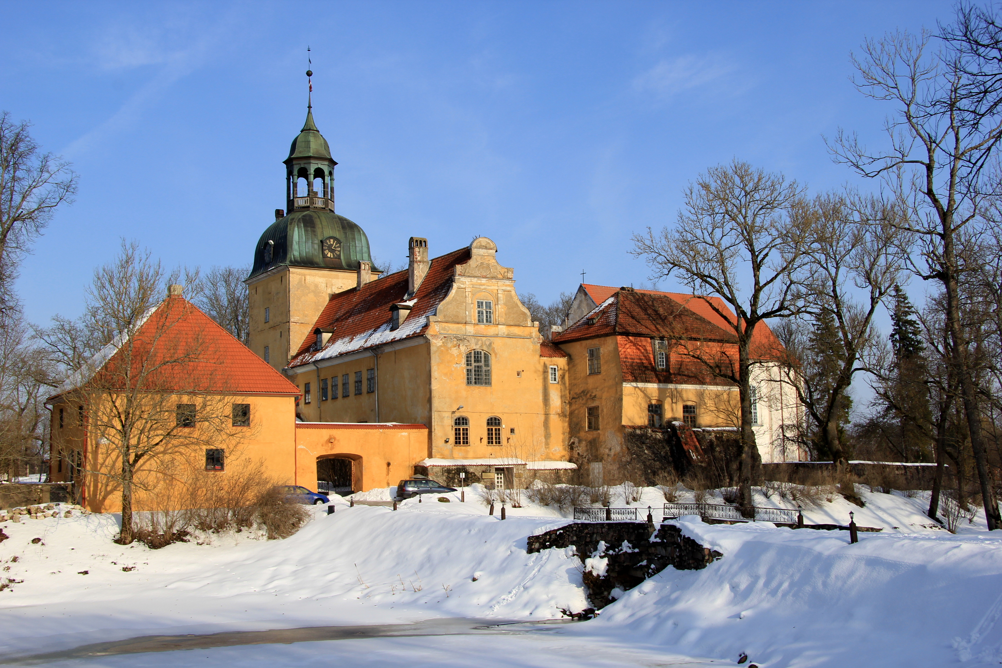 Lielstraupes pils. Lielstraupe Castle. Schloss Gross-Roop